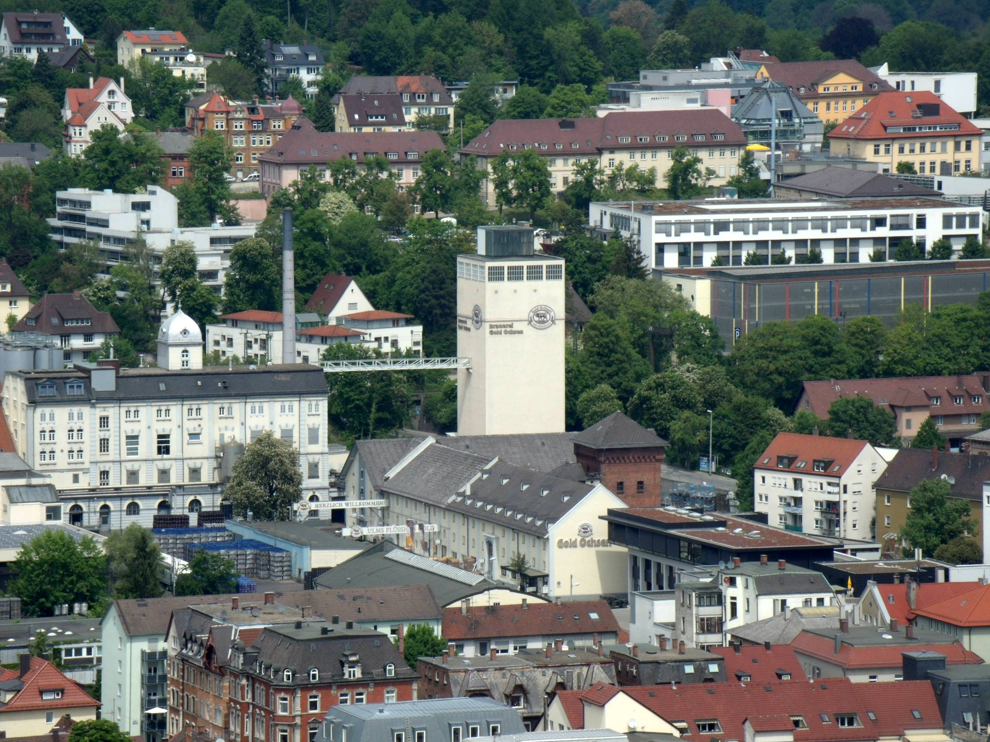 Der Goldene Ochse